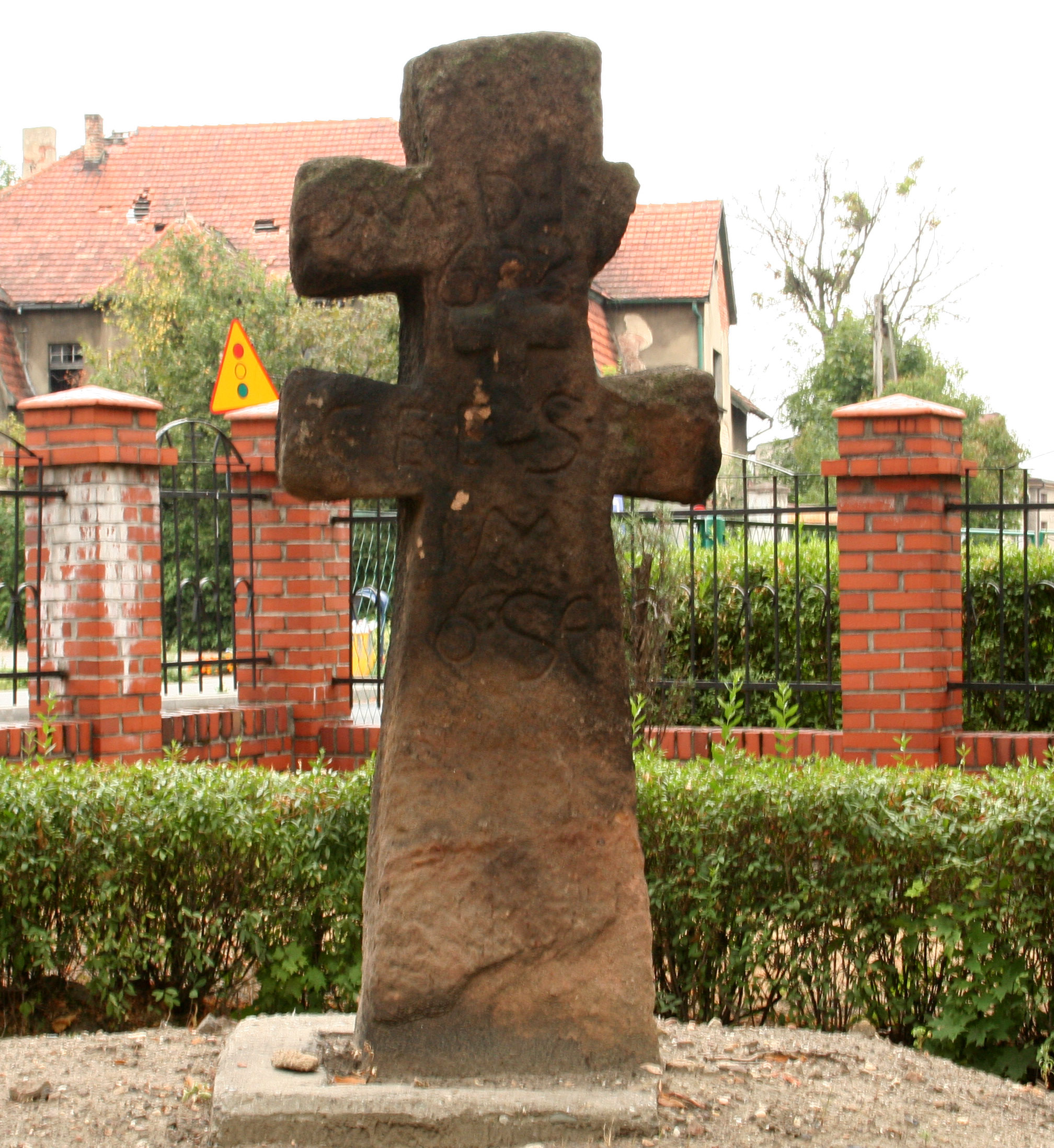 Krzyż pokutny w Rydułtowach.